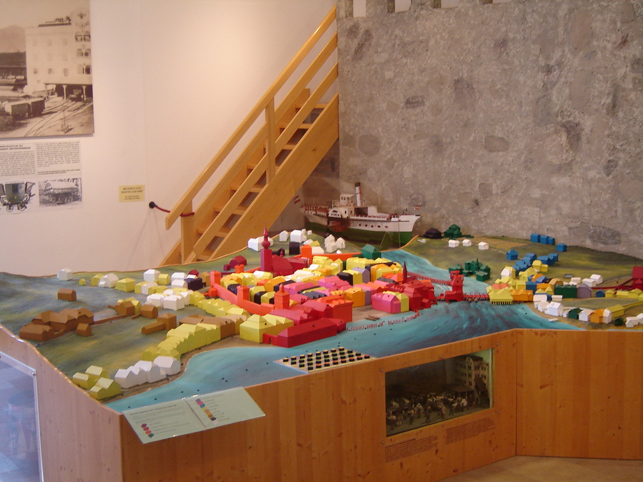 Stadtmodell von Gmunden